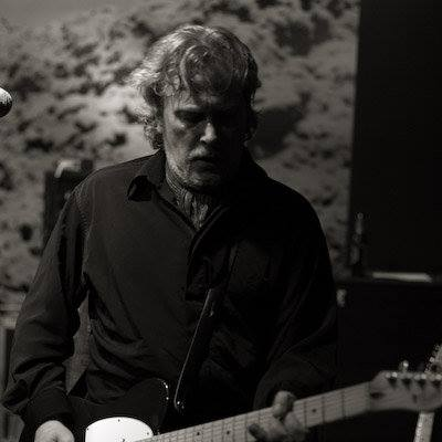 Fredric Holmquist, live med the Amazing brytaollah Ferrarys